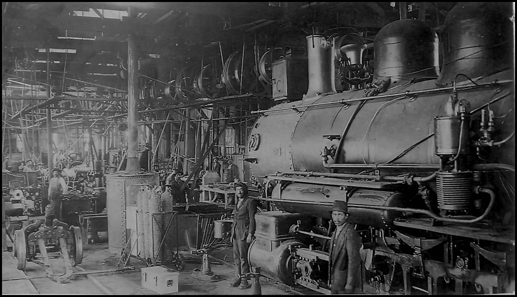 Maestranza principal en Uyuni, Bolivia, circa 1925.